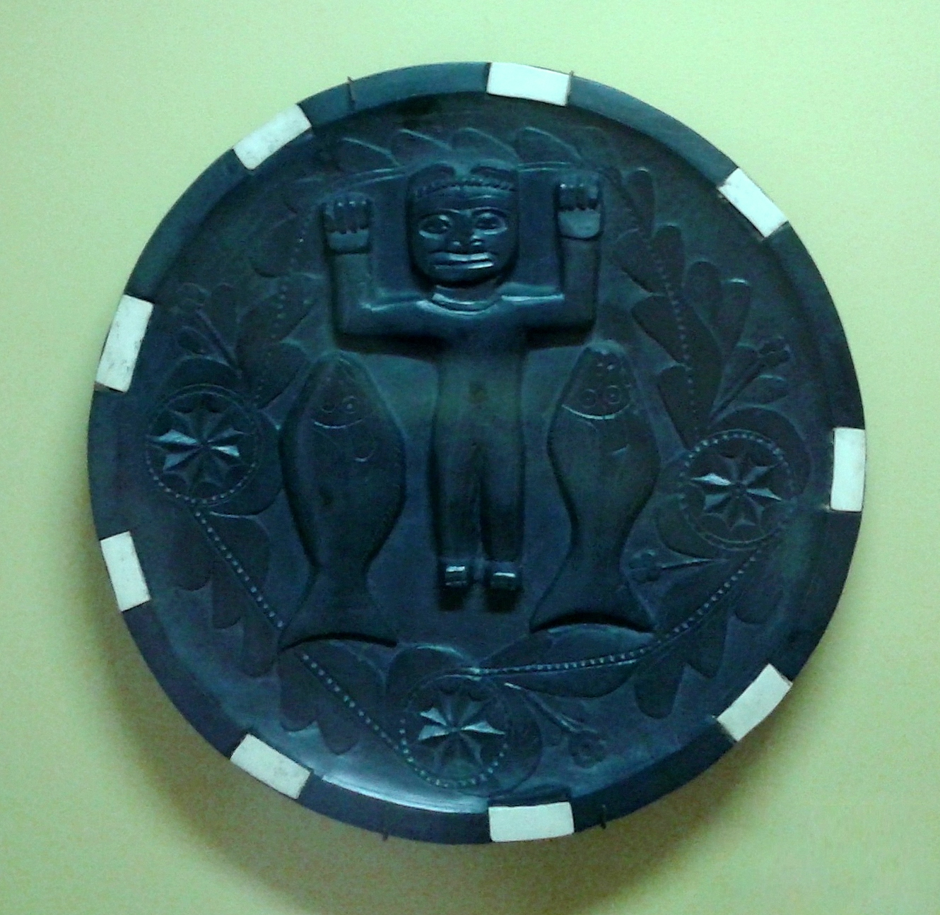 Português do Brasil: Bandeja esculpida, lavrada em basalto. Proveniente de Vancouver, Costa do Pacífico. Acervo de etnologia do Museu Nacional/UFRJ - Rio de Janeiro, Brasil.